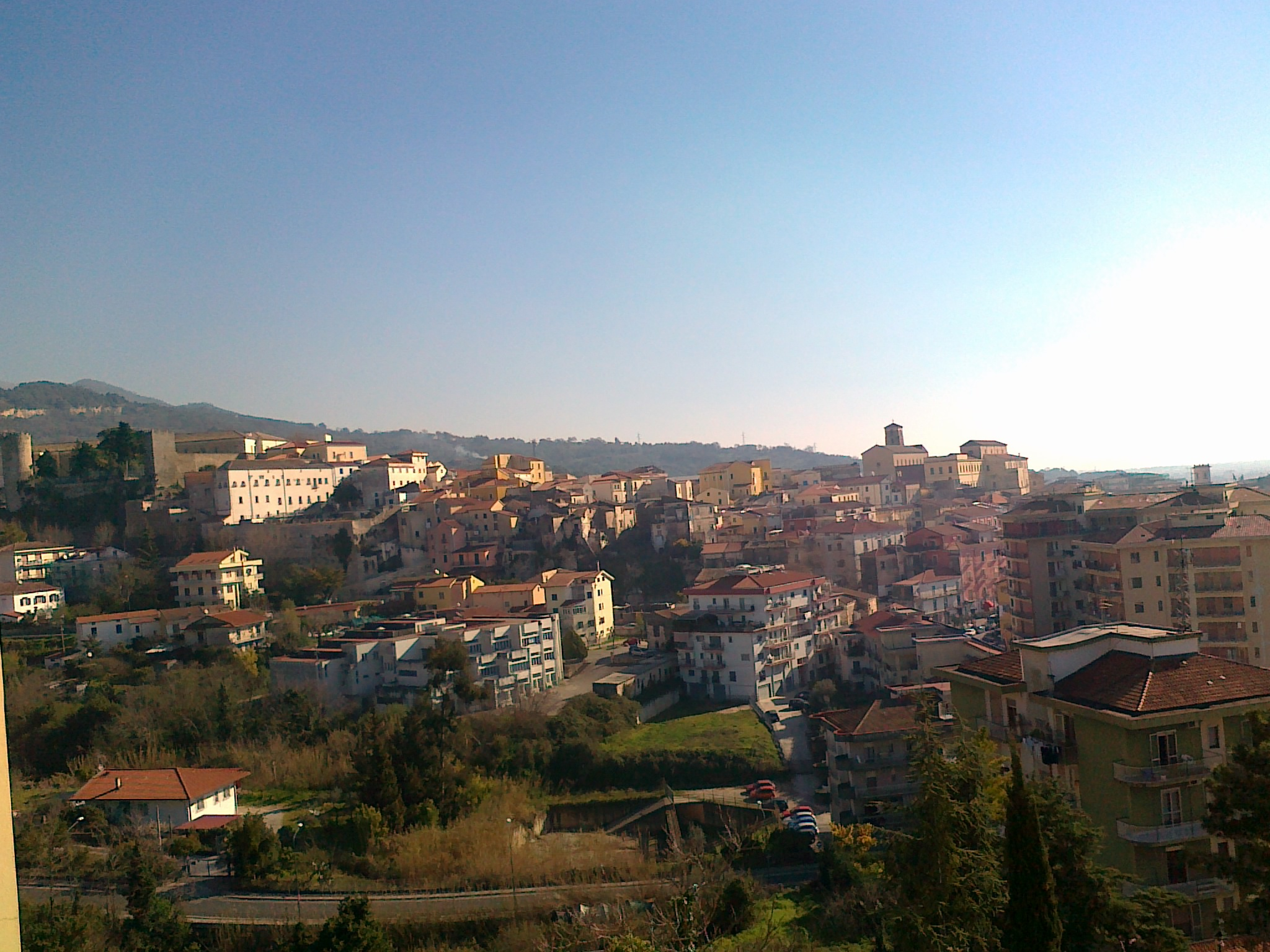 Panorama del centro storico di Eboli